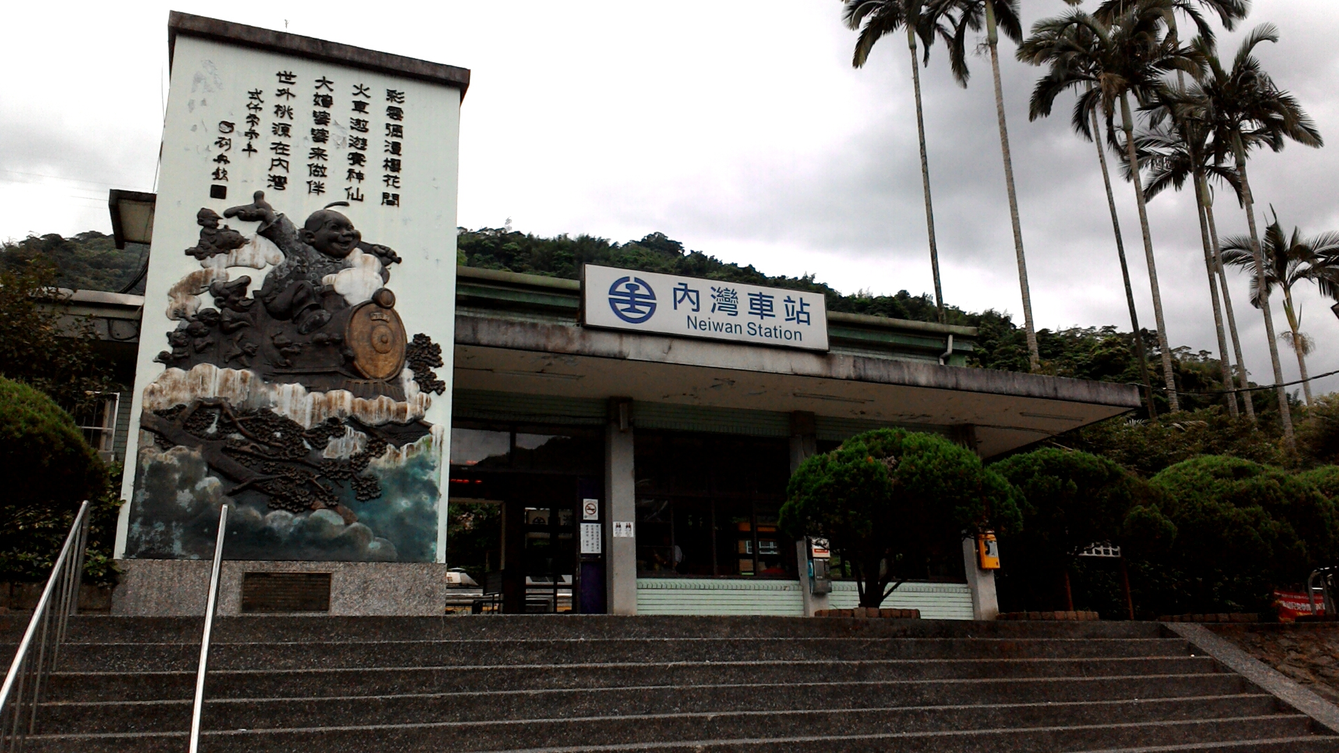 內灣車站站房